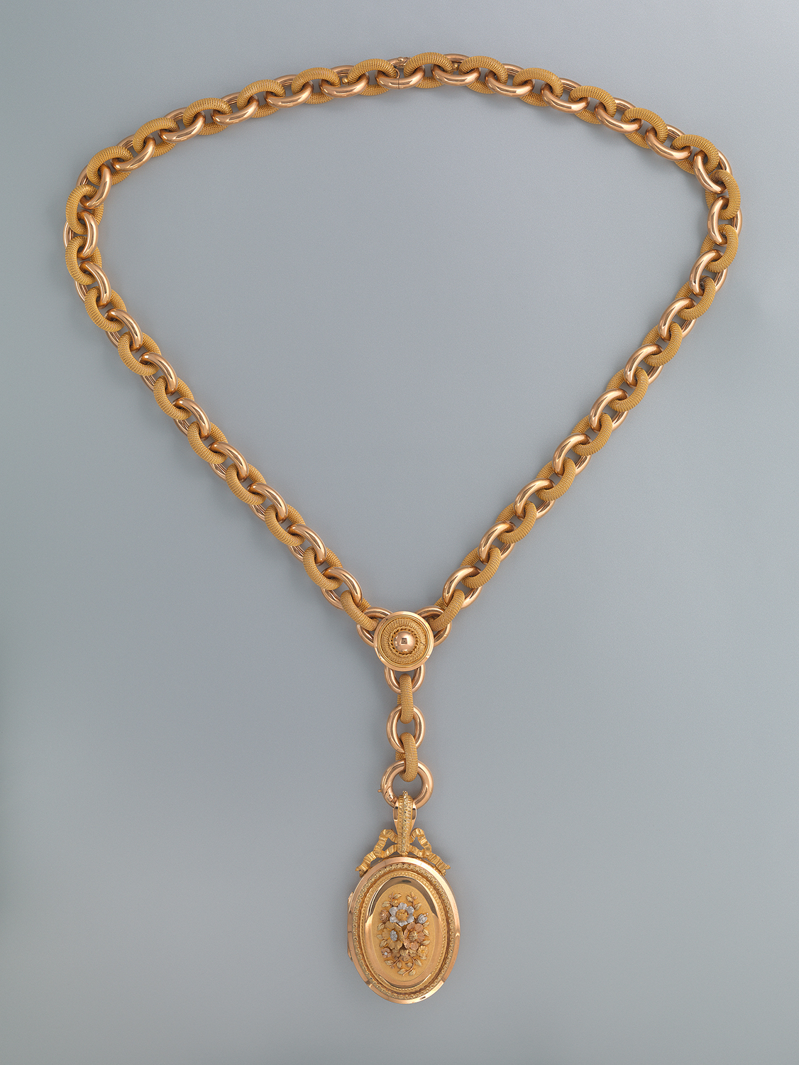 IdentificatieTitel: Schakelketting met een portretmedaillon Objectnummer: KA 3391Objecttype: chatelaine halsketting sieraad medaillon Huidige locatie: te zien in het Cromhouthuis, Herengracht 366-368, AmsterdamVervaardigingDatering: 1865 – 1885 Geproduceerd in: ParijsMateriaal: goud Verwerving en rechtenLicentie: CC CC0Naamsvermelding: Amsterdam MuseumDuurzaam webadres